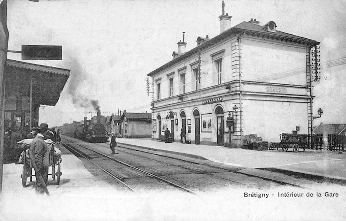 Le bâtiment de la gare de Brétigny, construit en 1862 par la compagnie du PO. La ligne ne dispose encore que de deux voies.